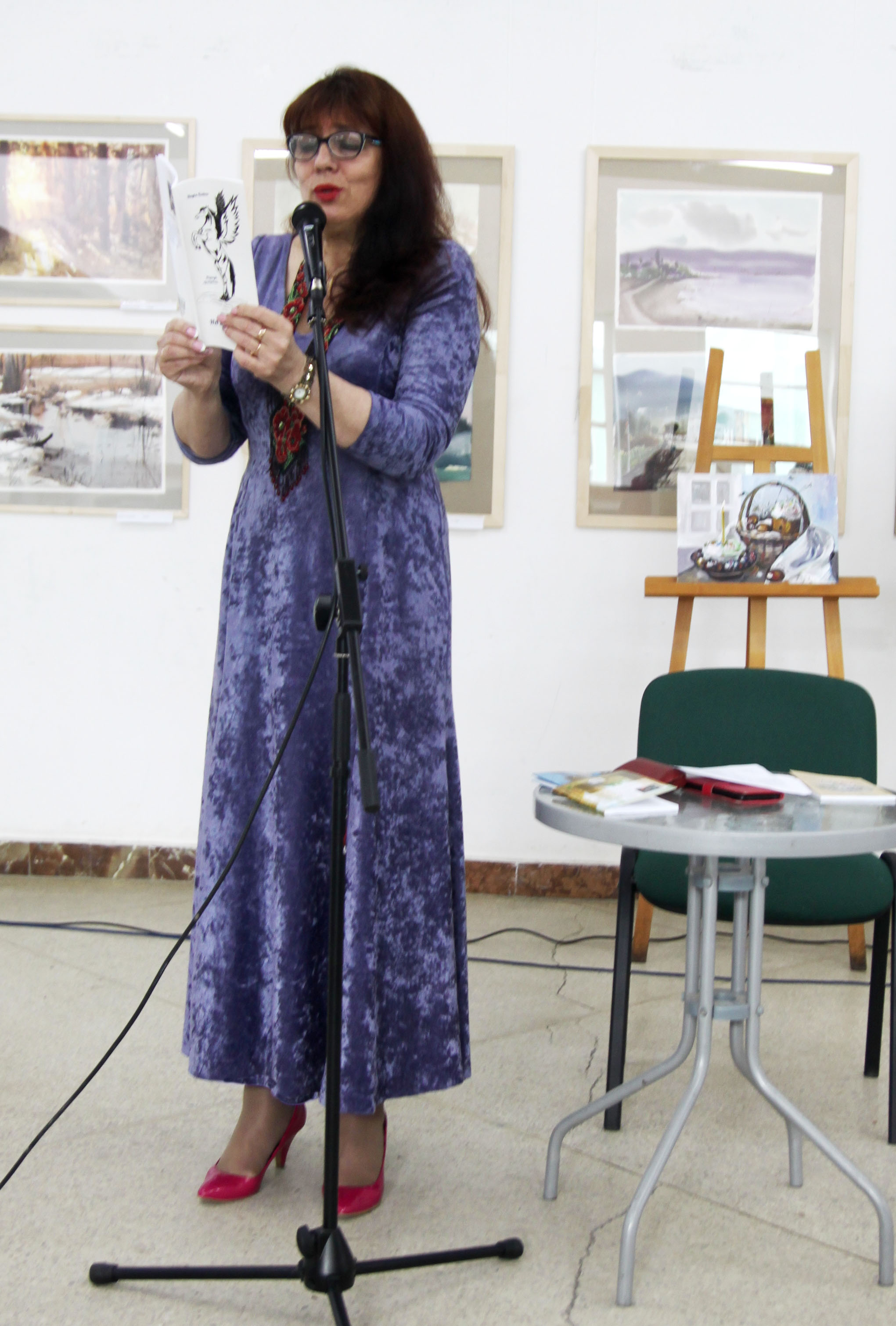 виступ